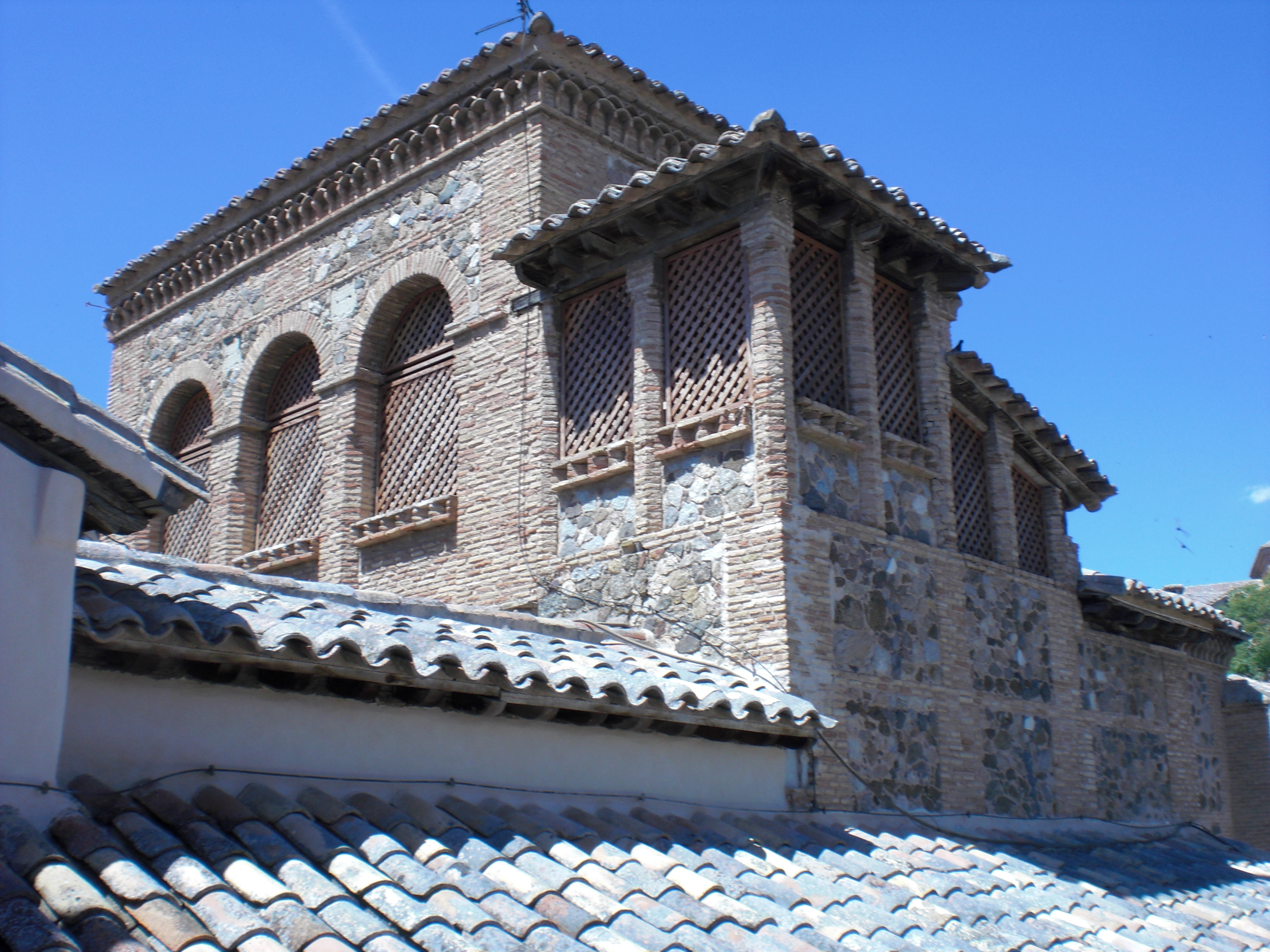 Tegmentoj de la Muzeo El Greko en Toledo